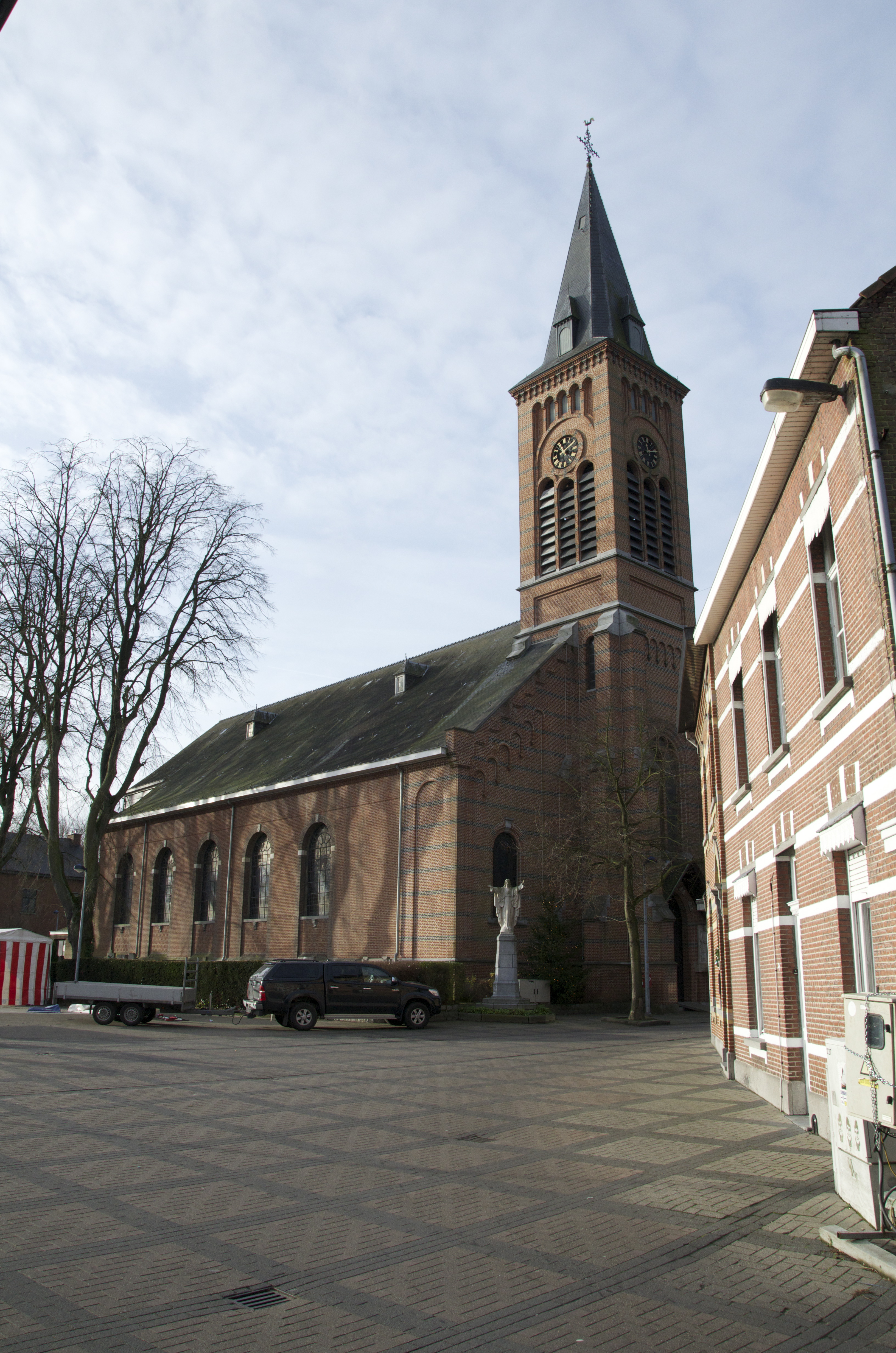 Sint-Margarethakerk, Wintam